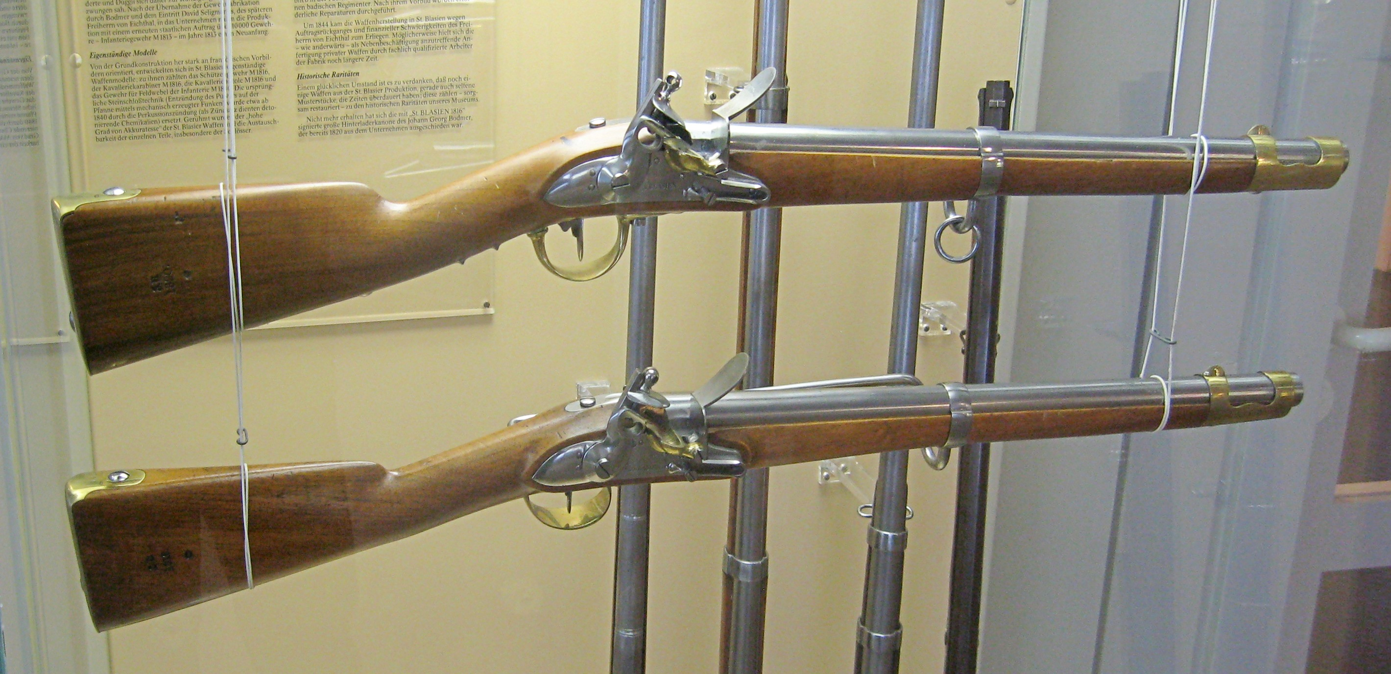 Waffenproduktion in Sankt Blasien